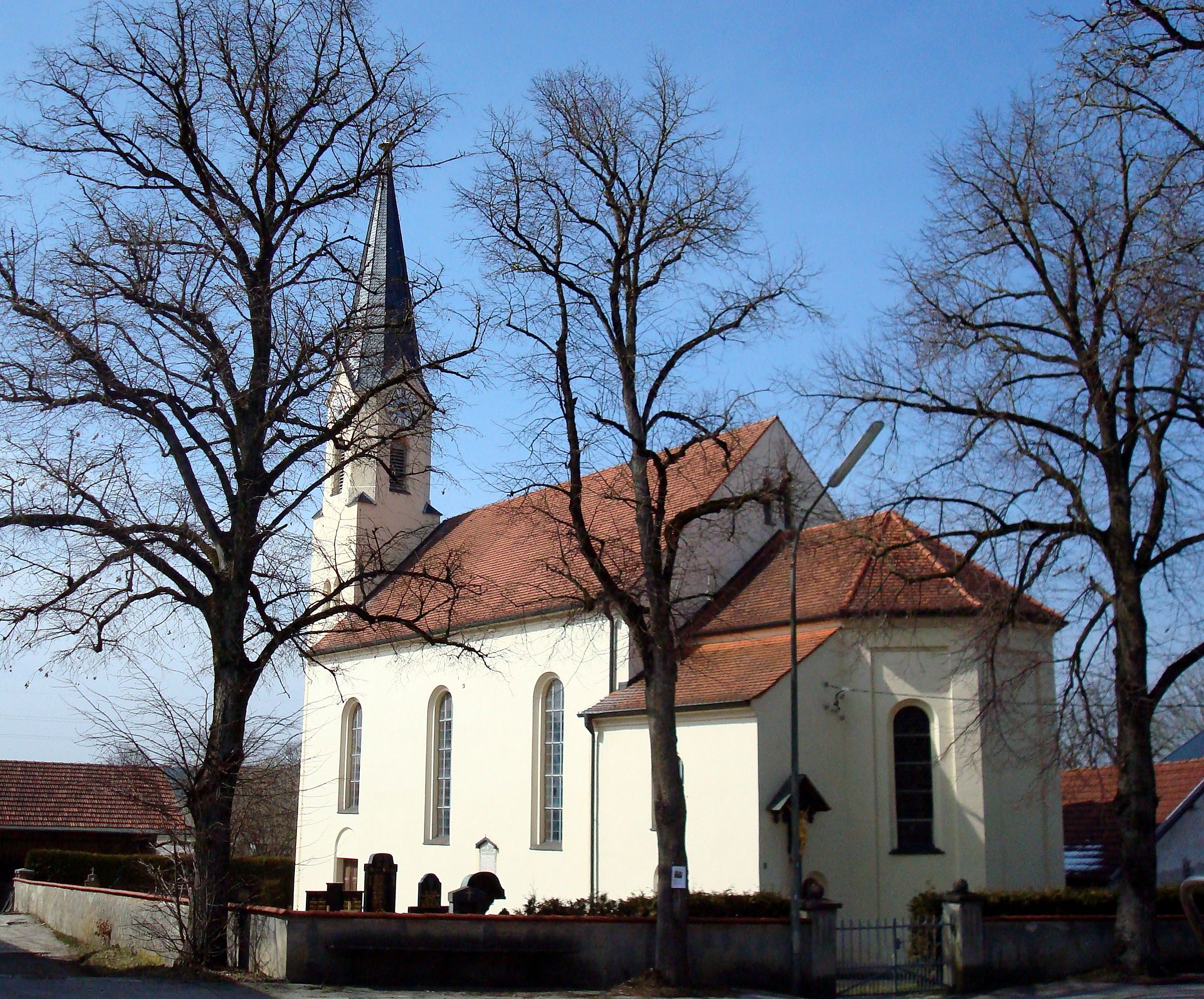 Gauting, OT Oberbrunn, Landstraße 3. Die Kirche St. Peter und Paul wurde 1862/64 neu errichtet. Lediglich das Turmuntergeschoss erinnert an einen spätgotischen Vorgängerbau. This is a photograph of an architectural monument.